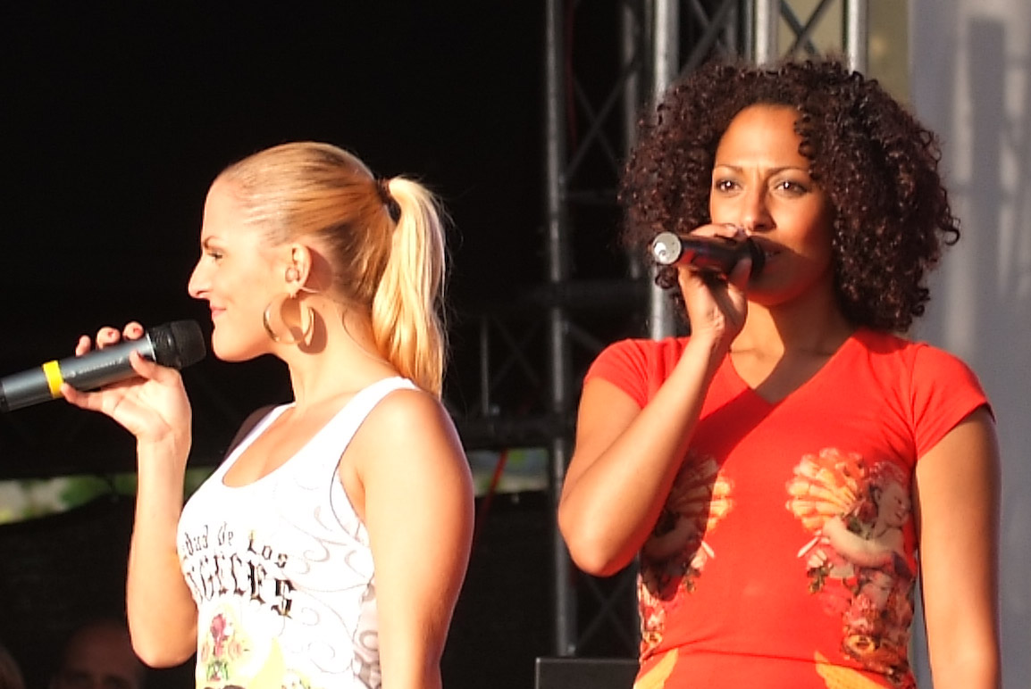 Sandy Mölling und Jessica Wahls in Kiel (2008)